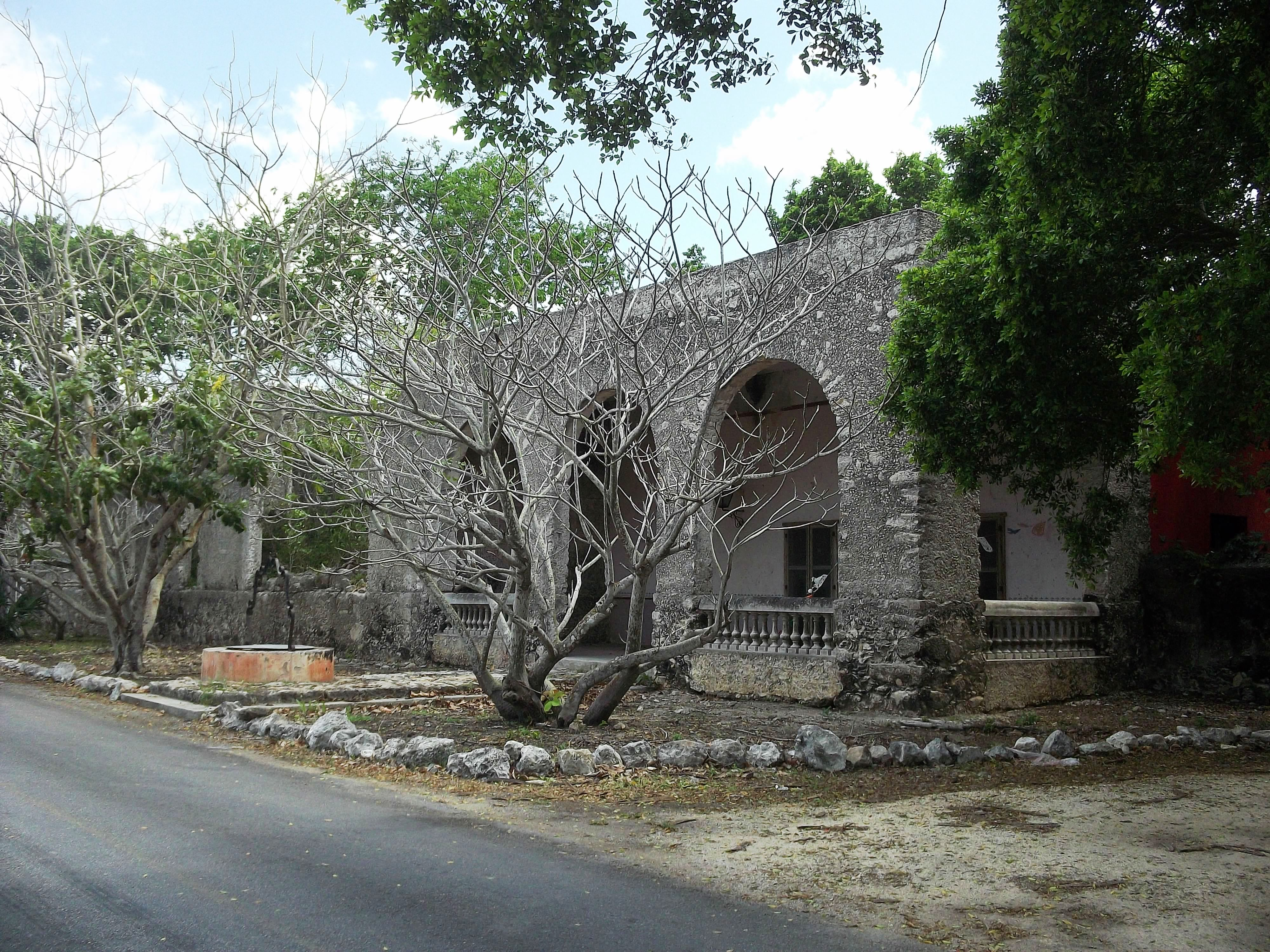 Hacienda de Kitinché (Tixkokob), Yucatán.